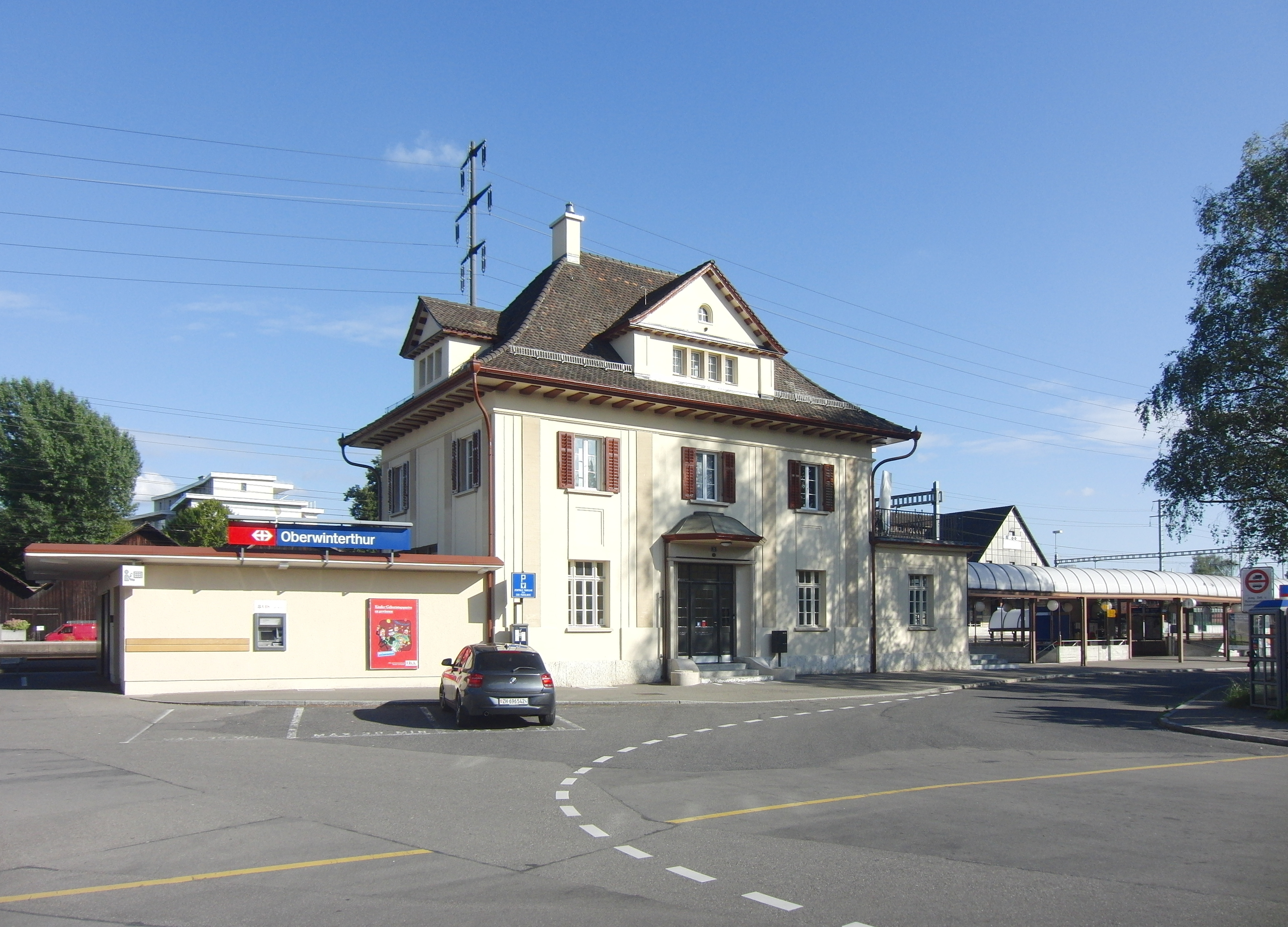 Bahnhof Oberwinterthur